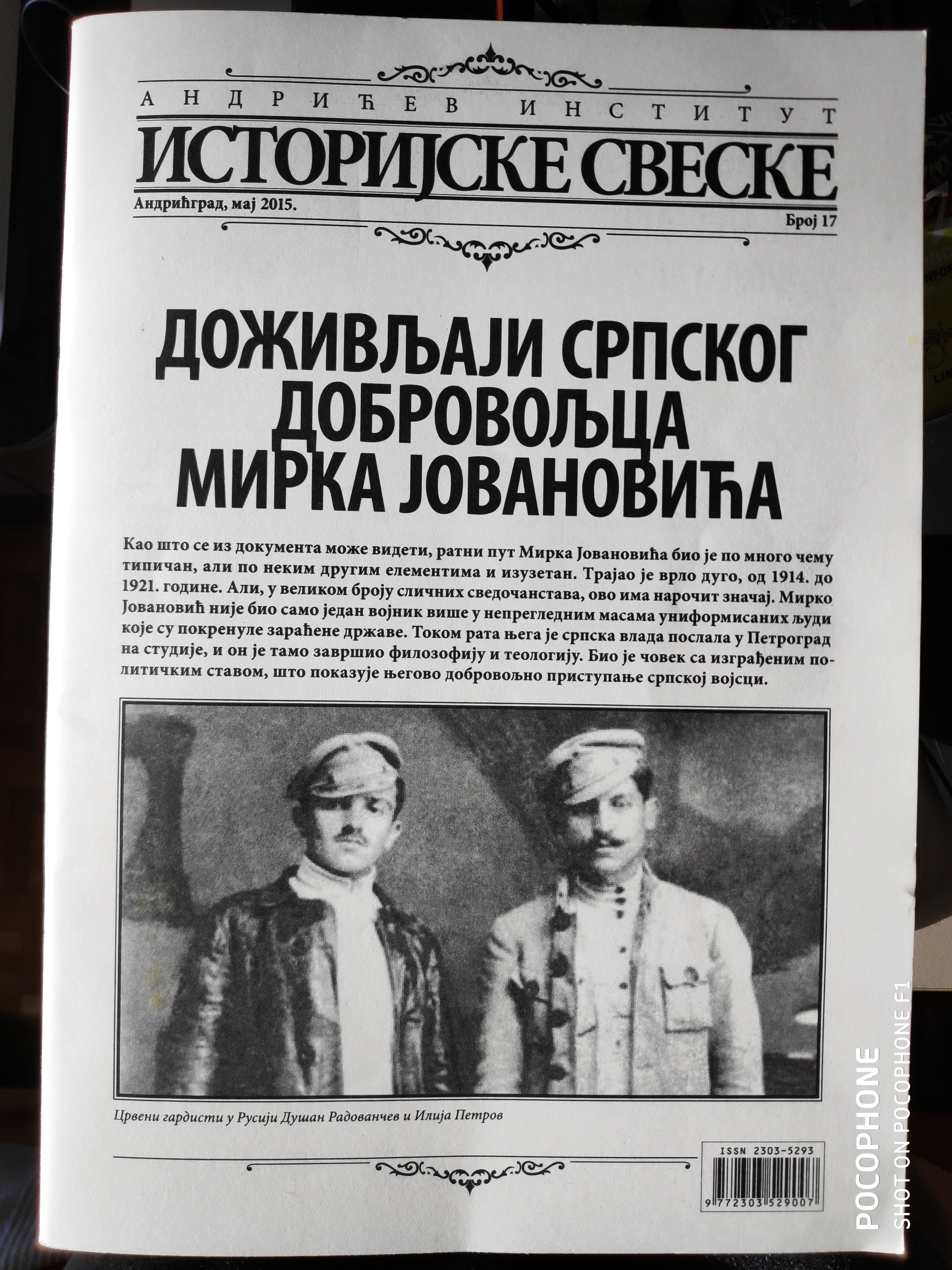 Istorijske sveske, broj 17, maj 2015, Doživljaji srpskog Dobrovoljca Mirka Jovanovića